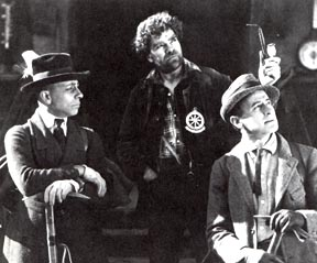 Кадр из фильма «Слепые мужья»